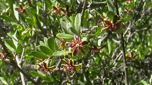 Walon: fleurs d' arganî so l' åbe